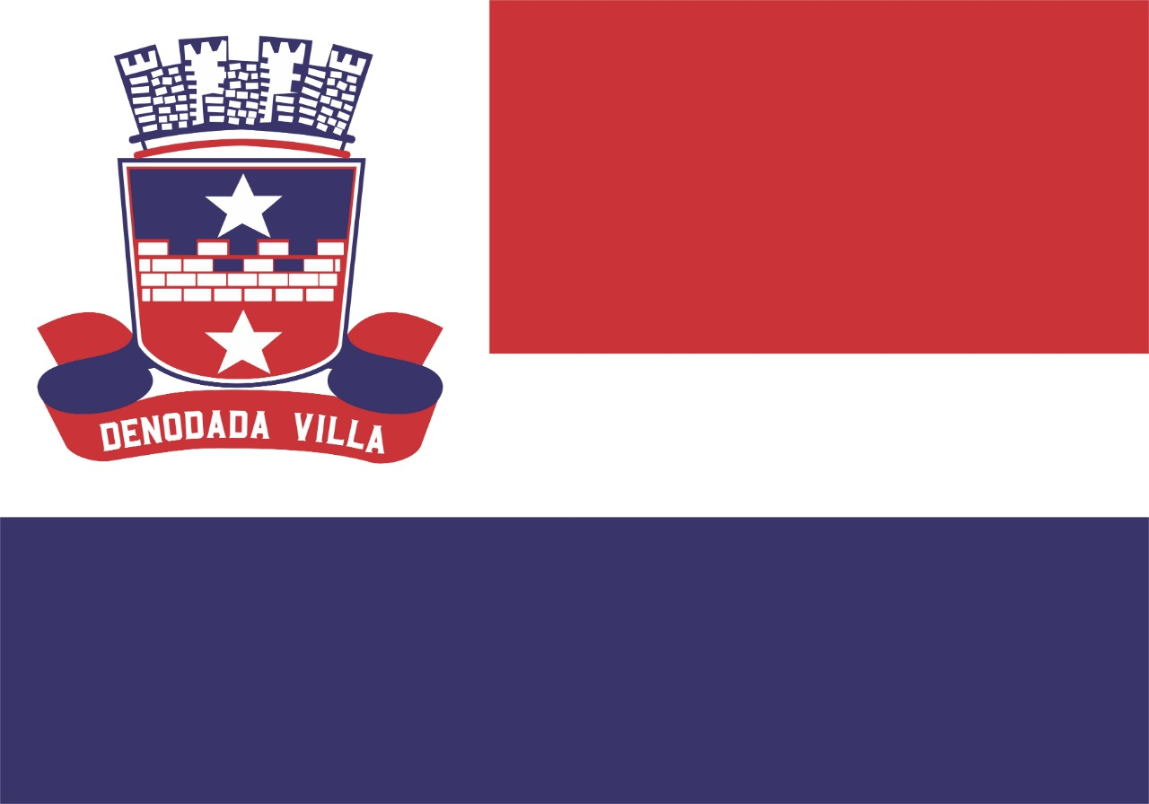 Bandeira do Município.